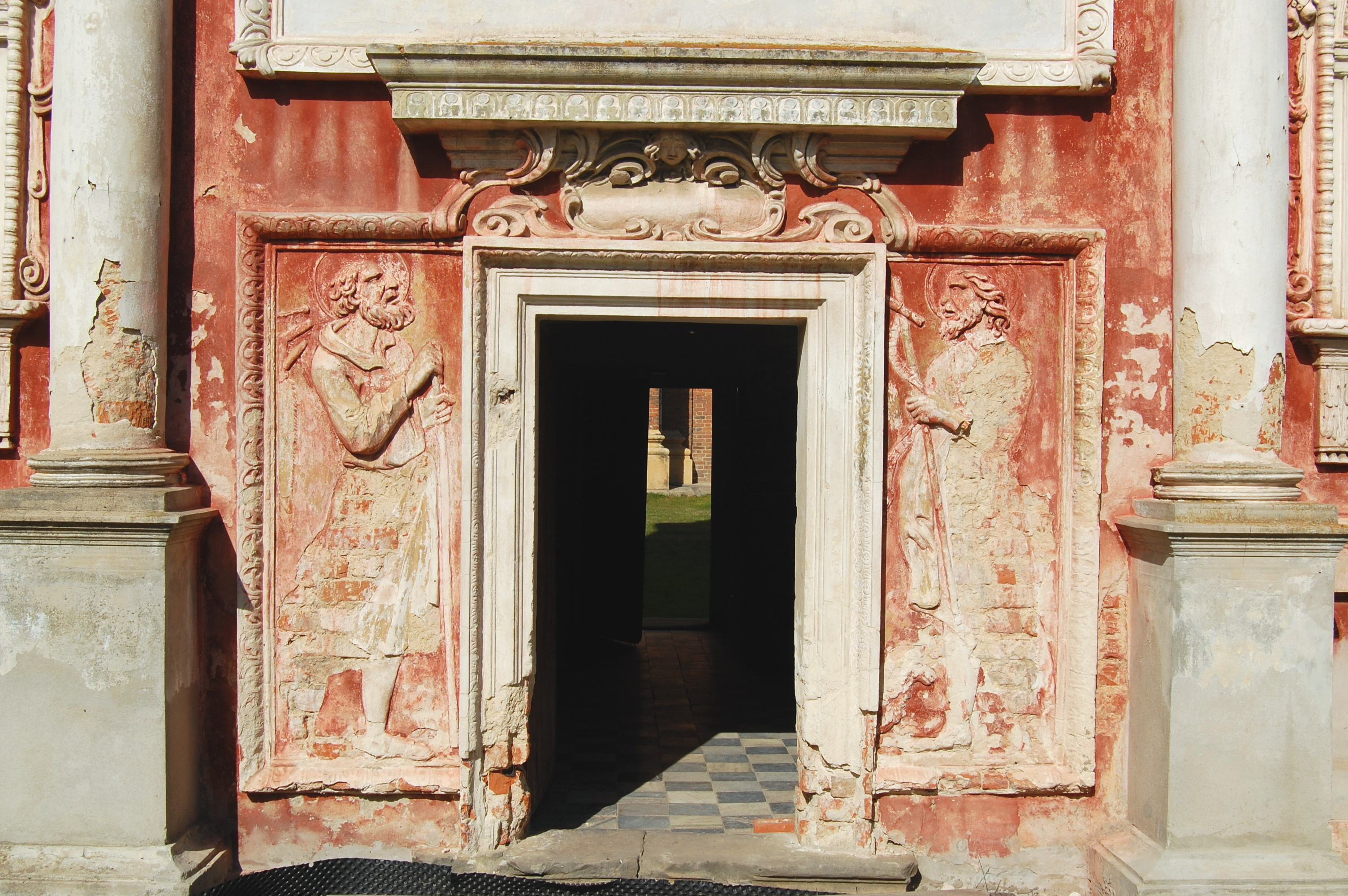 Zdobienia domku loretańskiego we wsi Gołąb w woj. lubelskim.